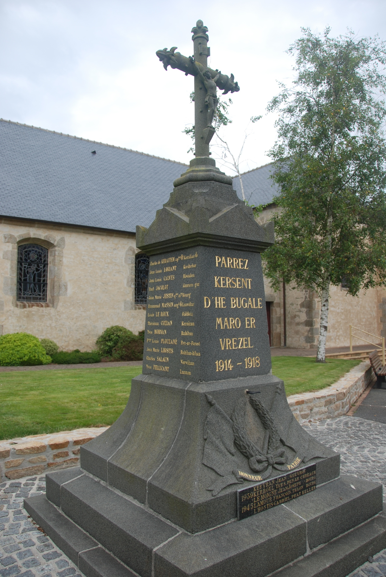 Monument aux morts - Kersaint-29